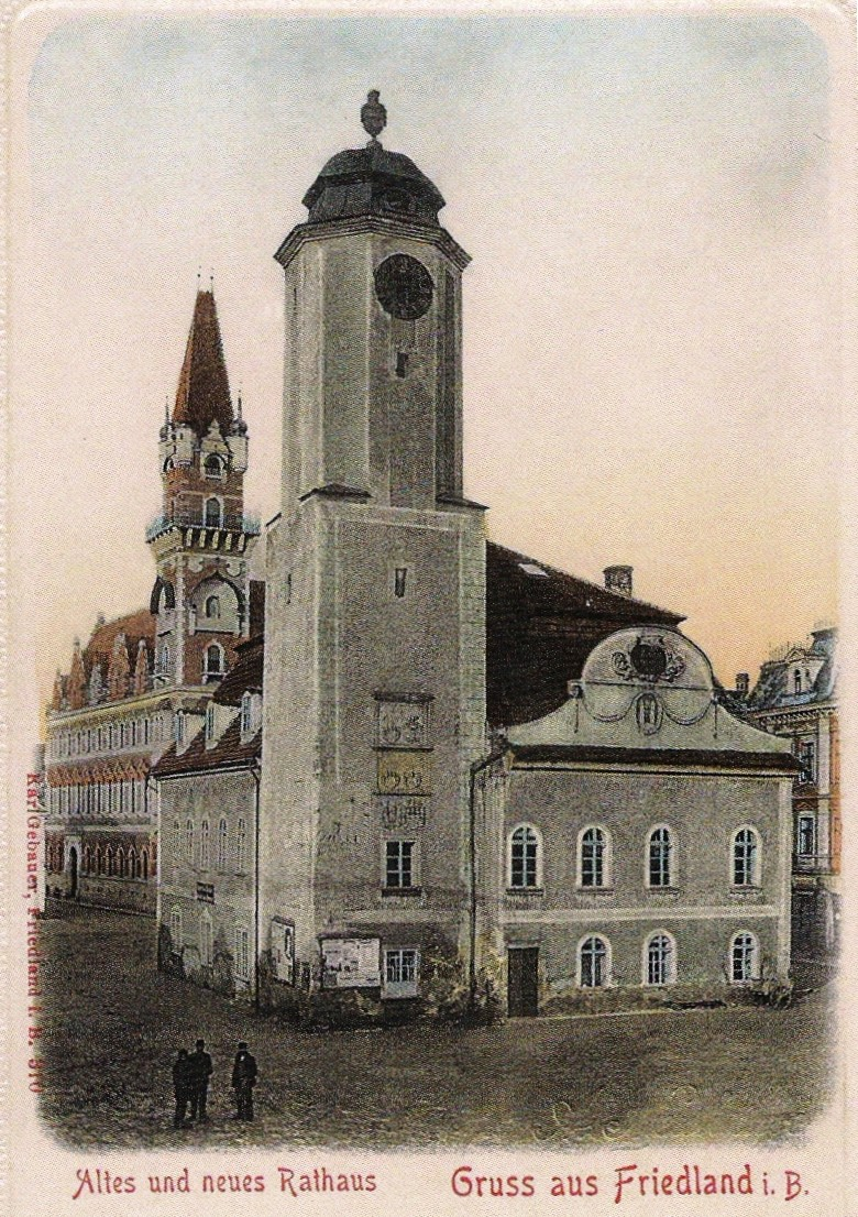 Stará a nová radnice v roce 1897 na frýdlantském náměstí.